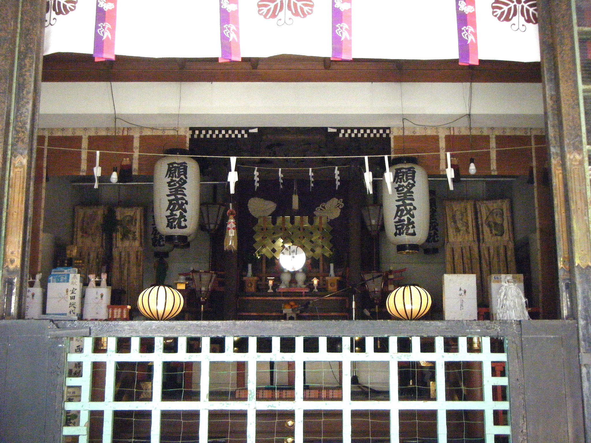 尼崎戎神社 拝殿奥に見える本殿 ※画像は撮影後のレタッチによる明るさ調整済。撮影時にフラッシュは使用していません。